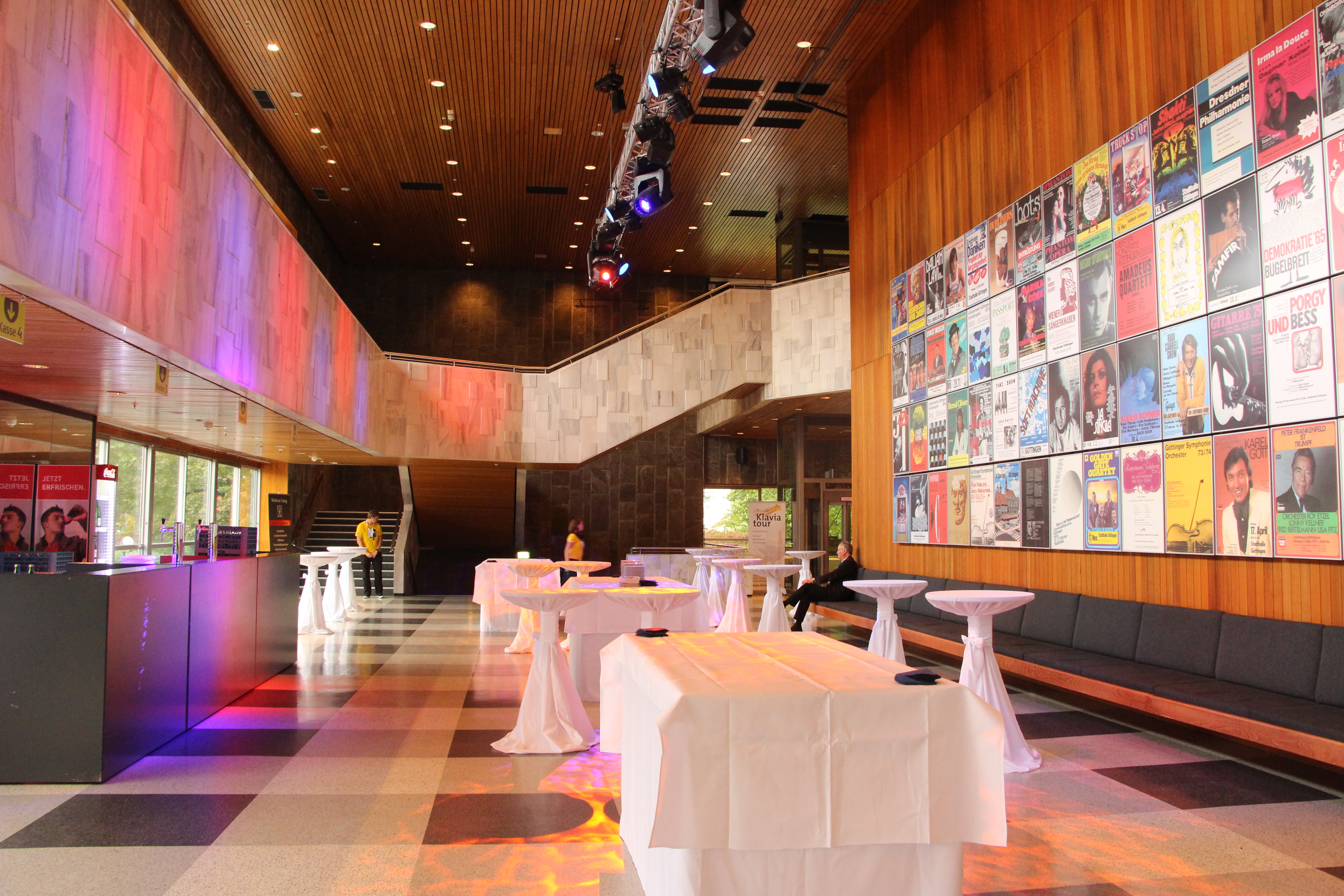 Historikertag 2014 in Göttingen.